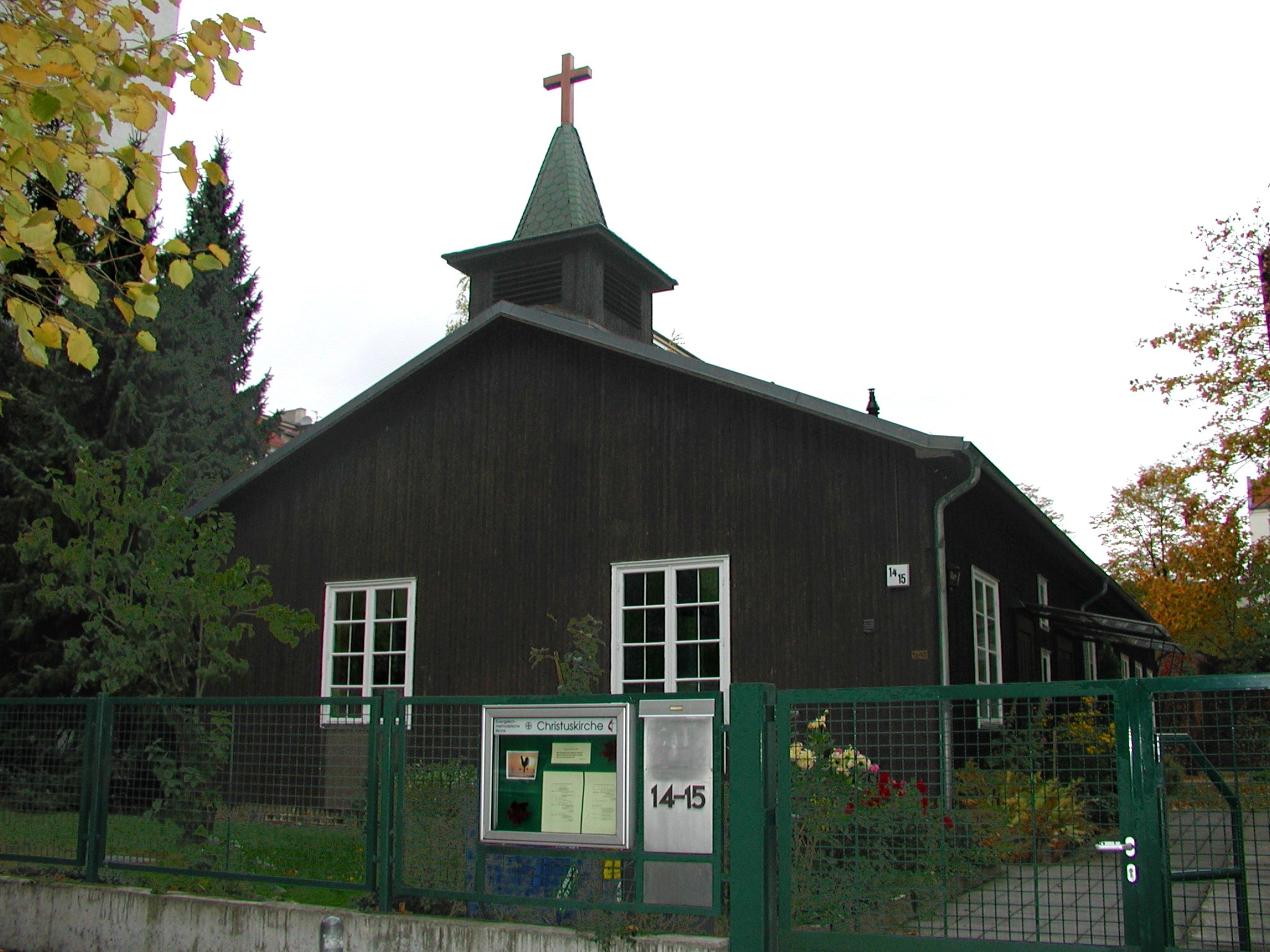 Christuskirche (3)